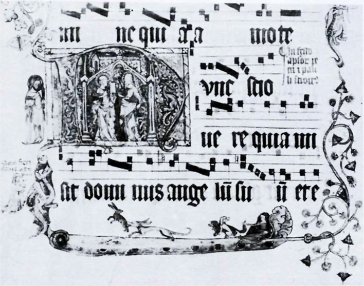 Köln, St. Klara. Blatt eines Stundengebetbuchs aus dem Skriptorium des ehemaligen Klarissenklosters